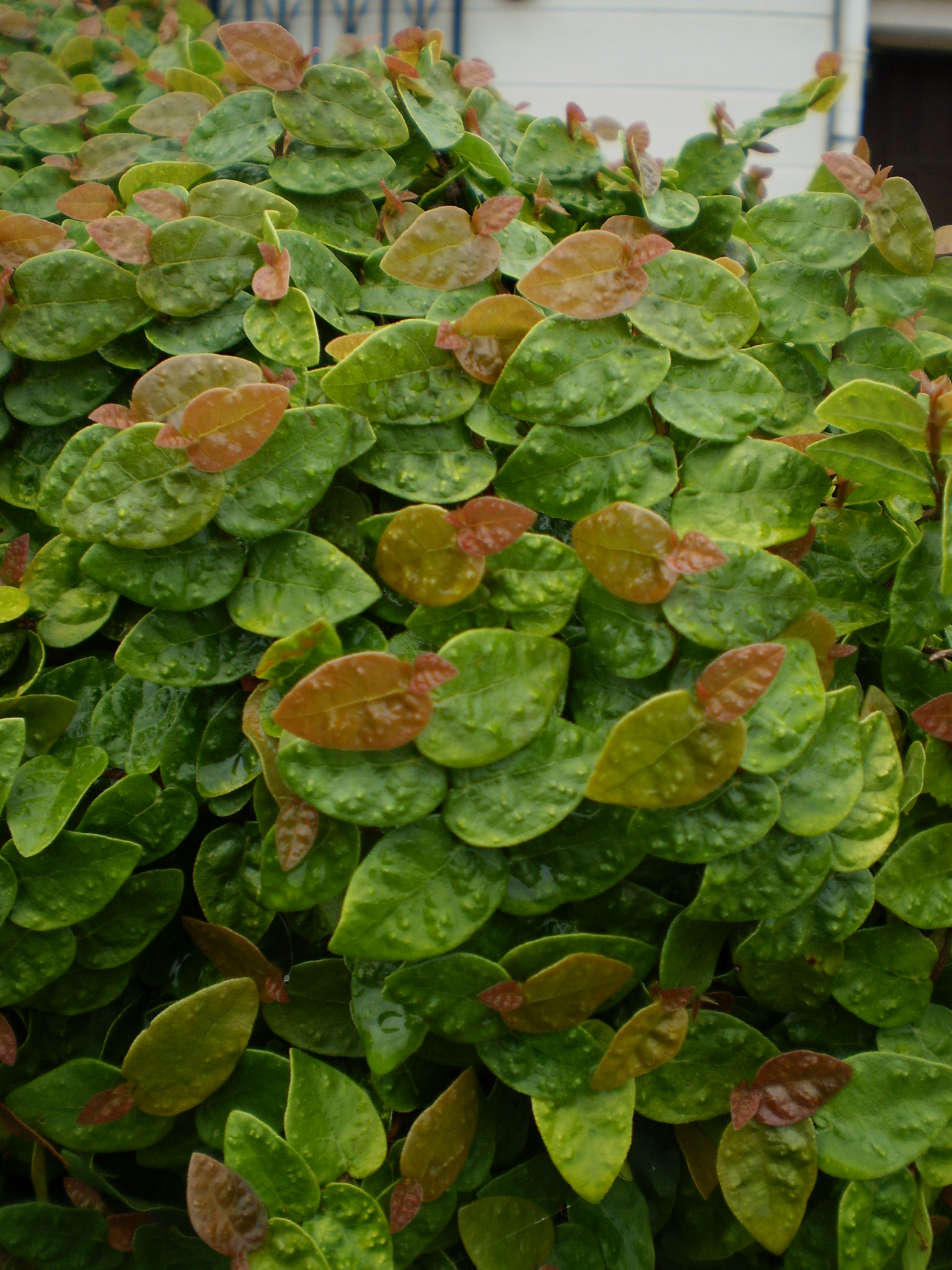 Pormenor de un Ficus repens, en el que se aprecian las hojas nuevas (rojizas).